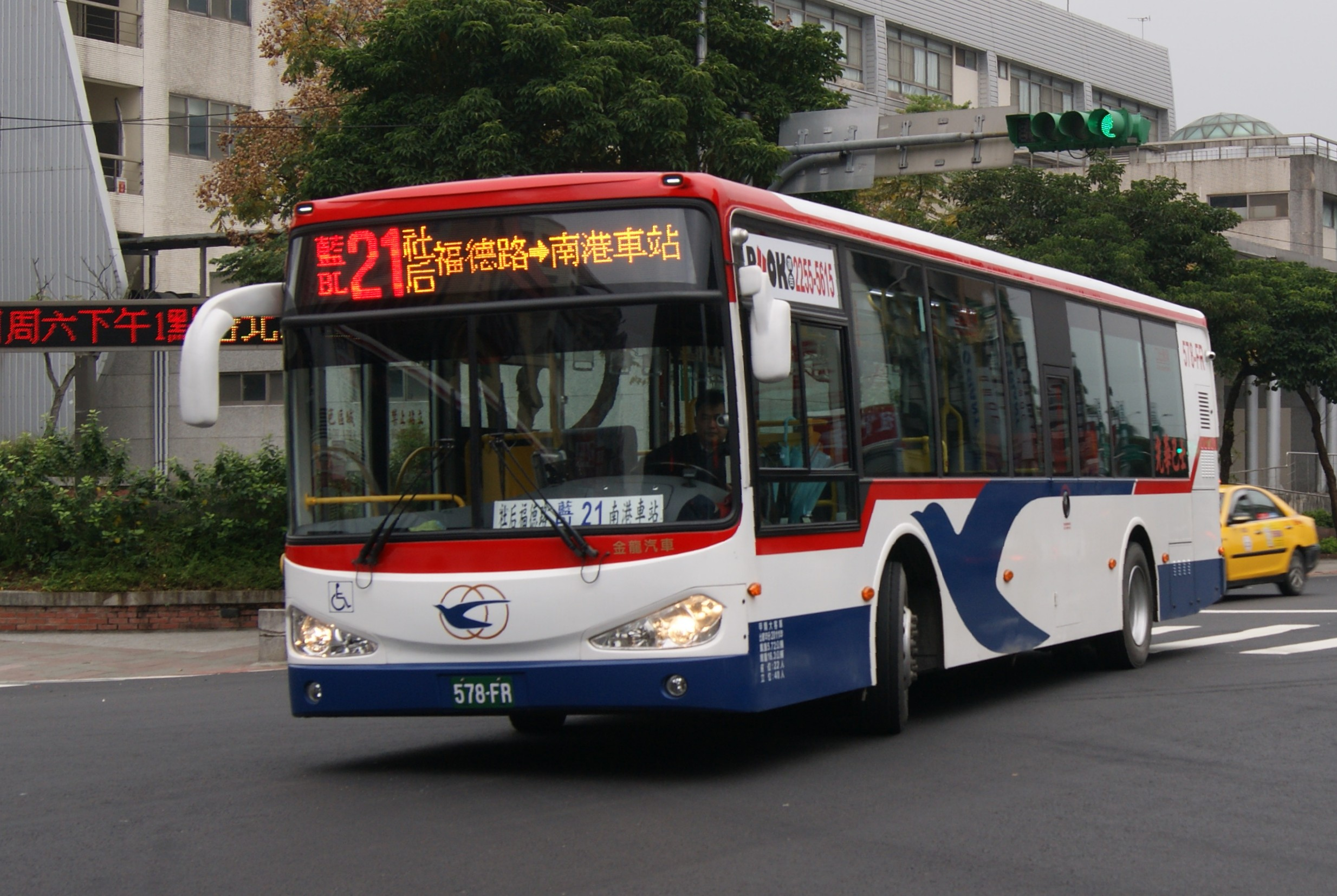 光華巴士578-FR 藍21